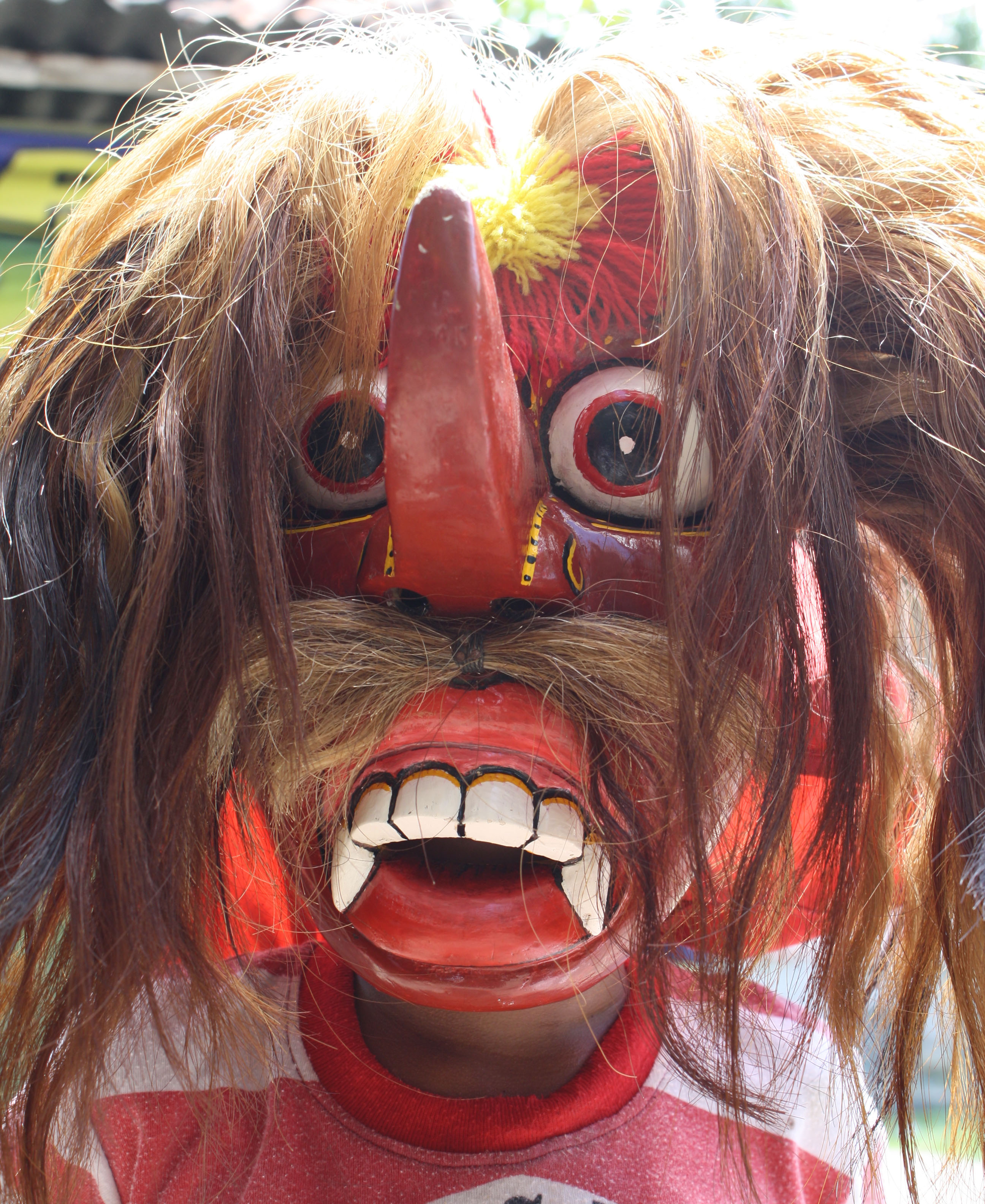 Barongan Topeng Kelana Jawa Tengah